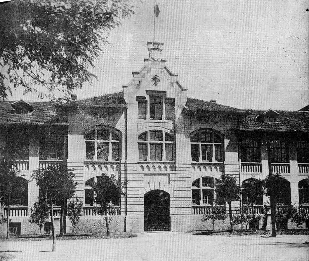 国立山东大学文学院